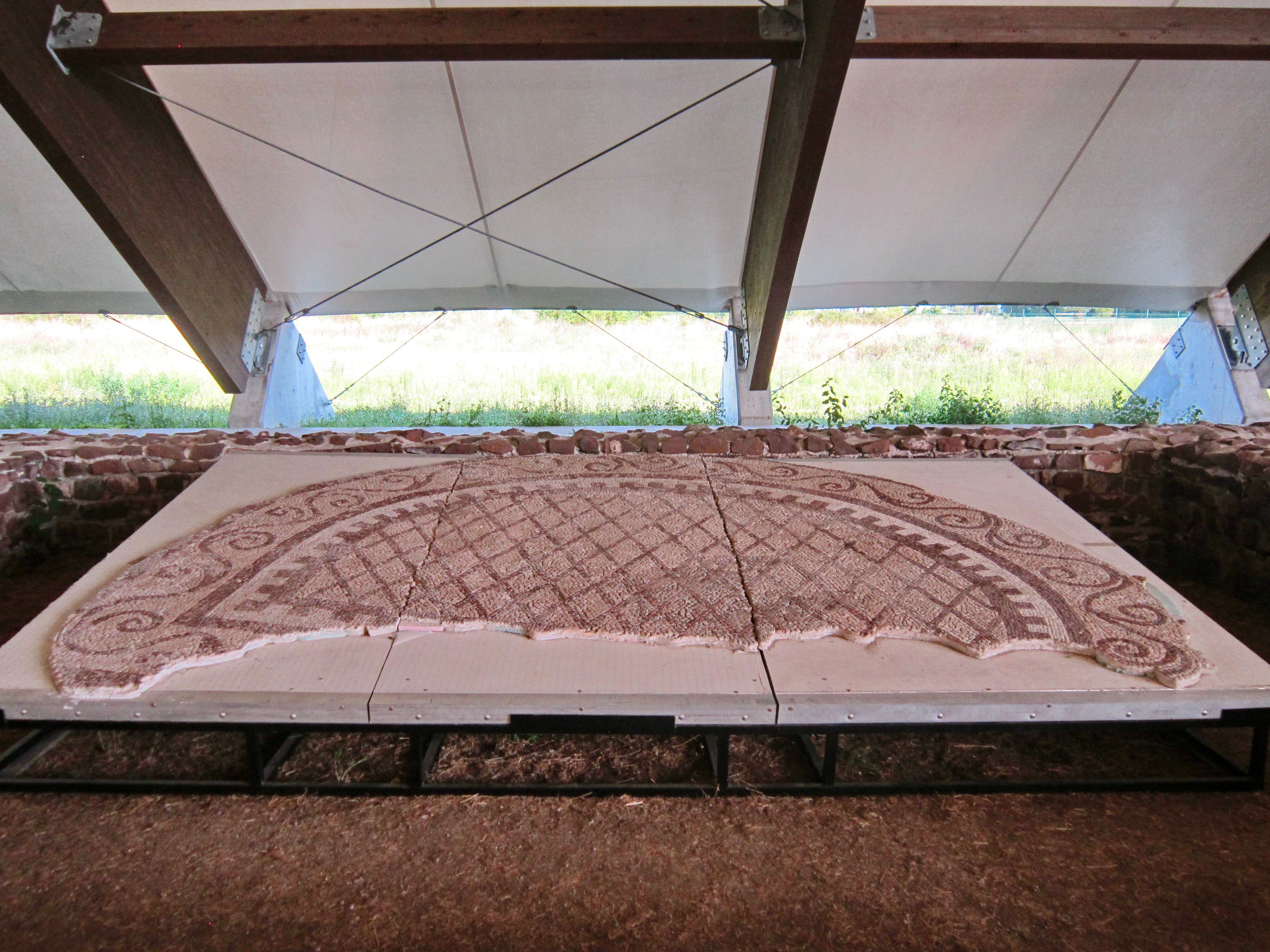 Српски (ћирилица): Медијана